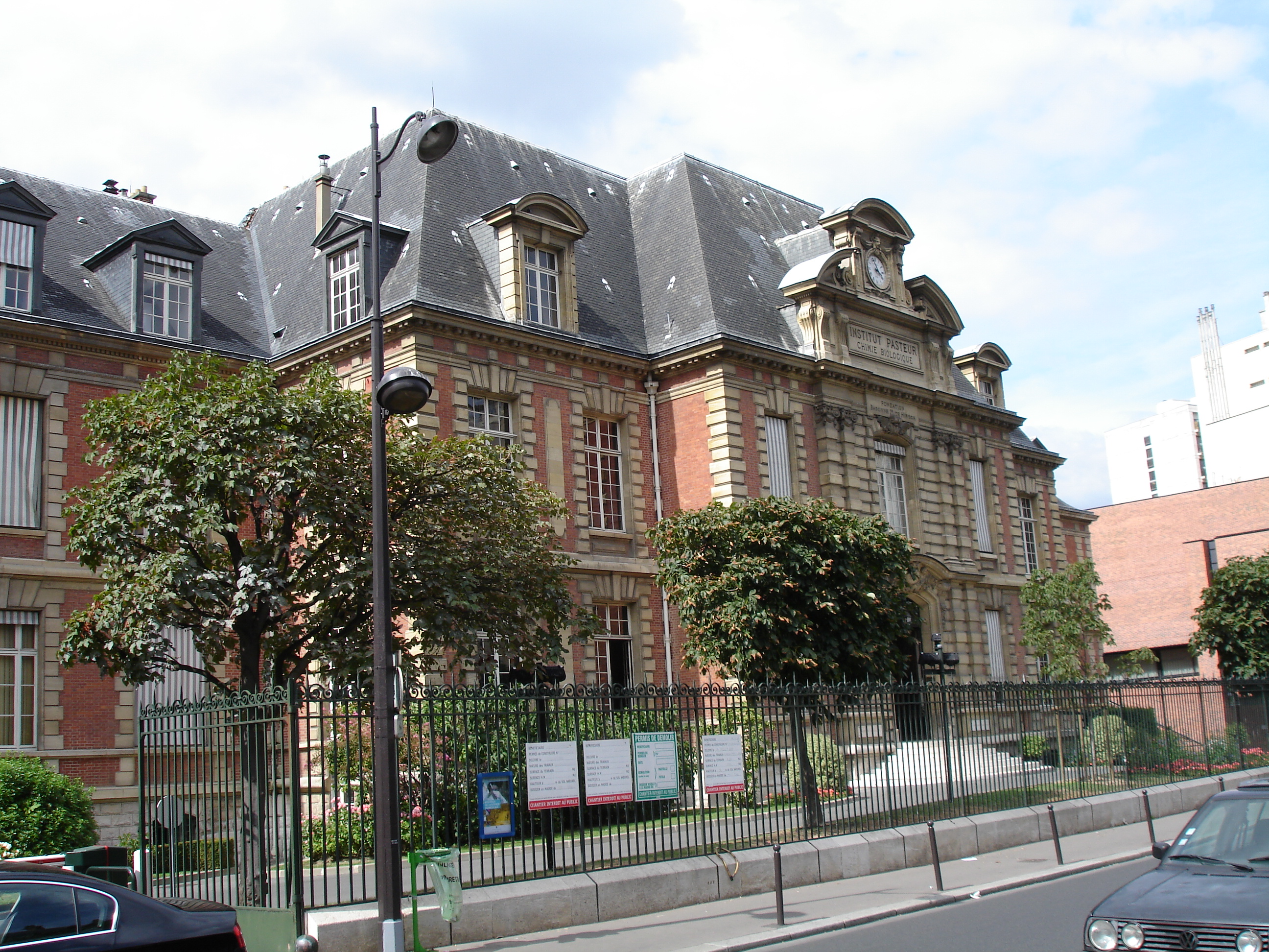 Institut Pasteur, Paris, XVe arrondissement, 25 rue du Docteur Roux, France.